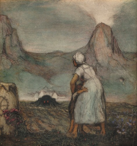 Die Schwarze Spinne; Kreide auf Papier, 54.5 x 51 cm; Kunstmuseum Luzern (Inv.-Nr. 209y)